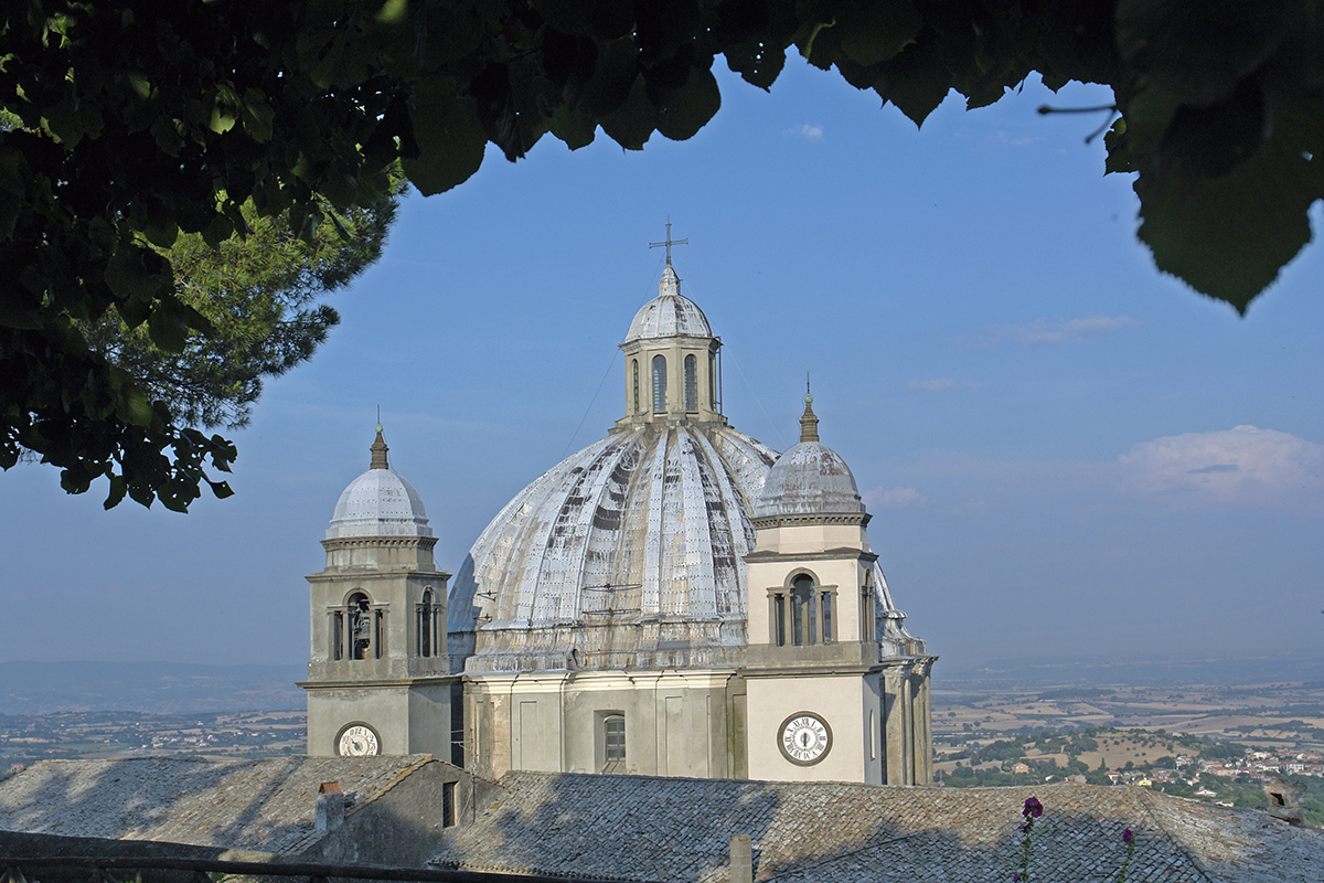 Montefiascone; Kirchenkuppel